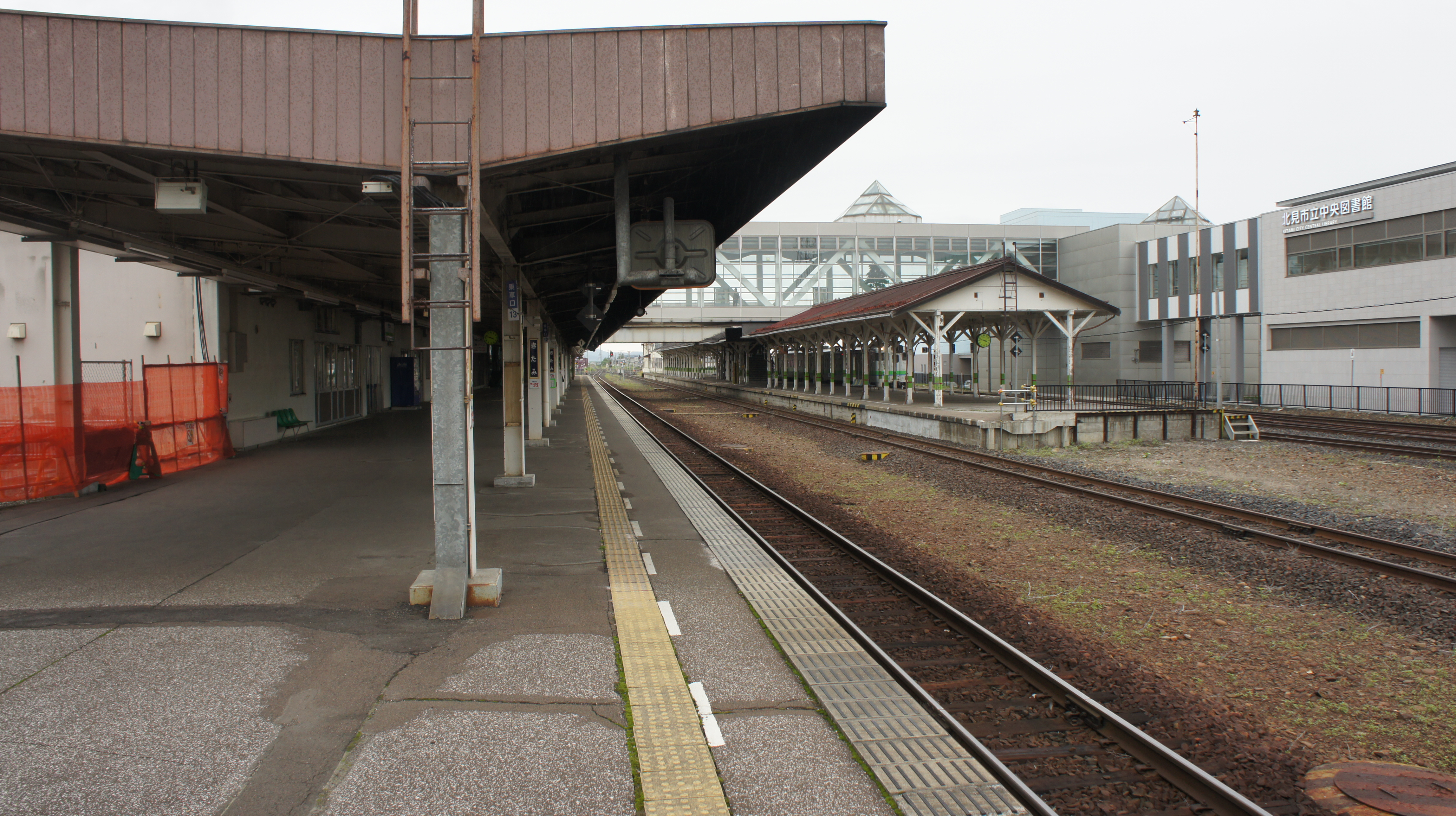 JR石北本線・北見駅のホーム